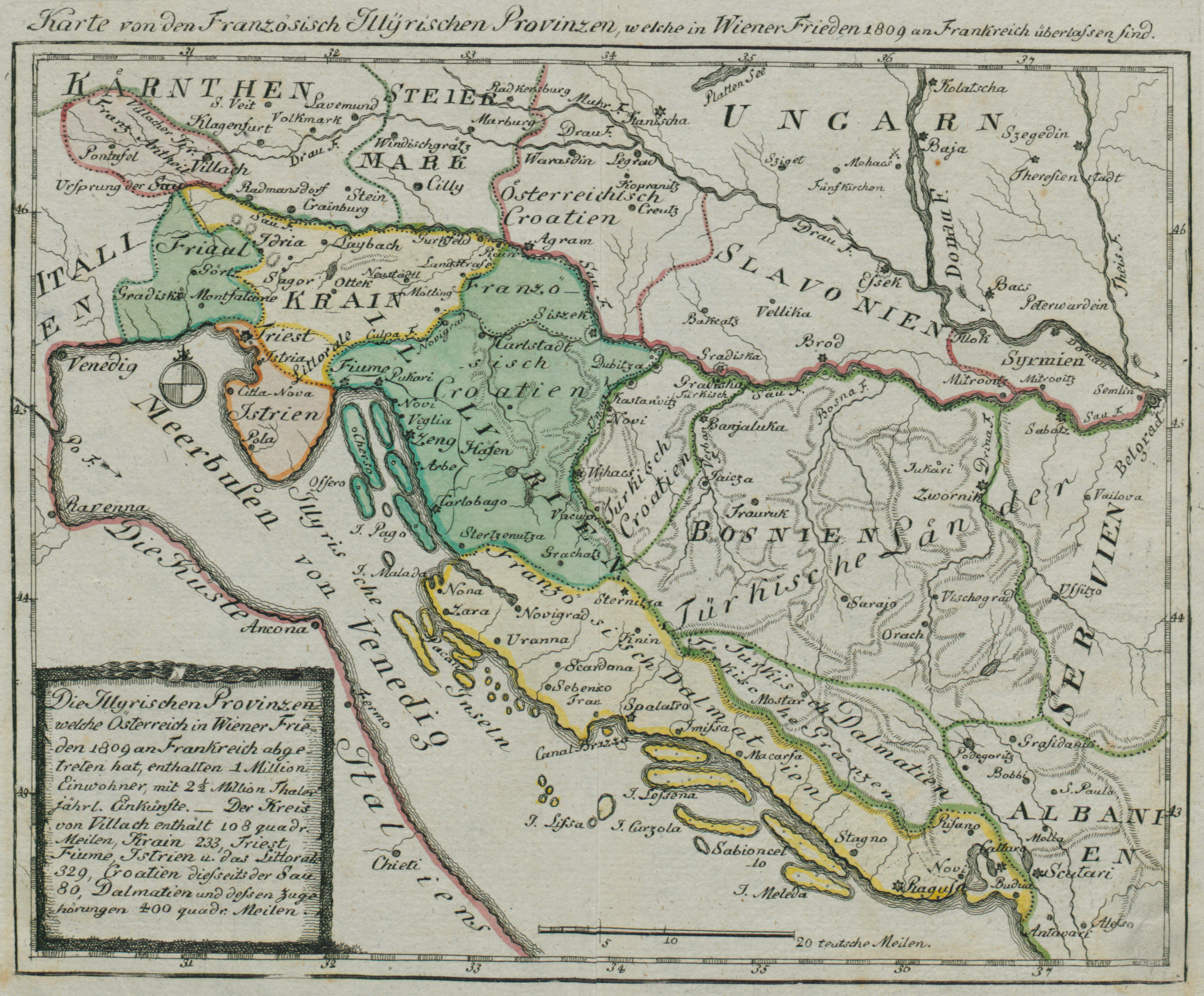 Upravni zemljevid Ilirskih provinc leta 1813